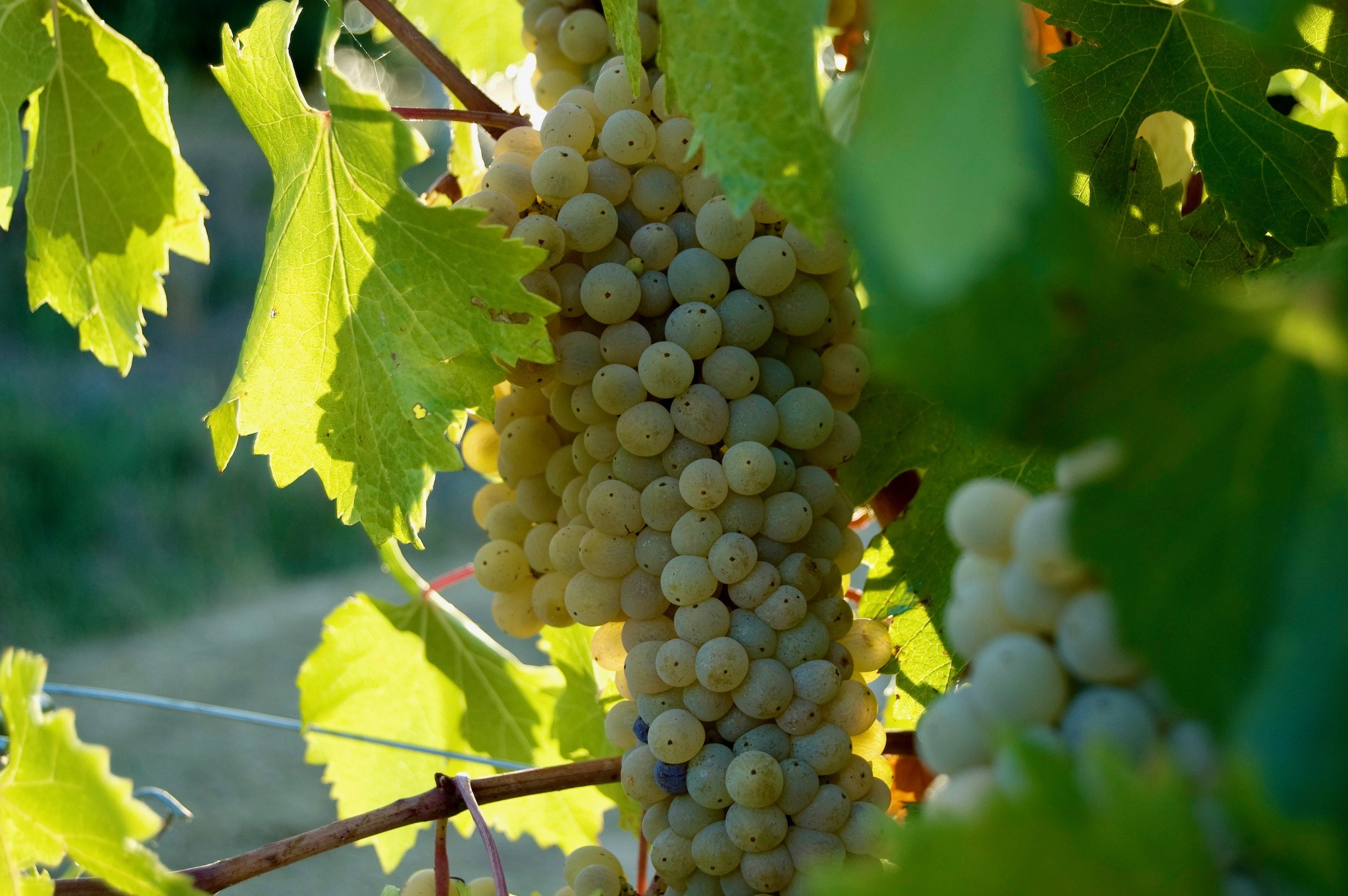 Image of Grachetto di Todi grapes.